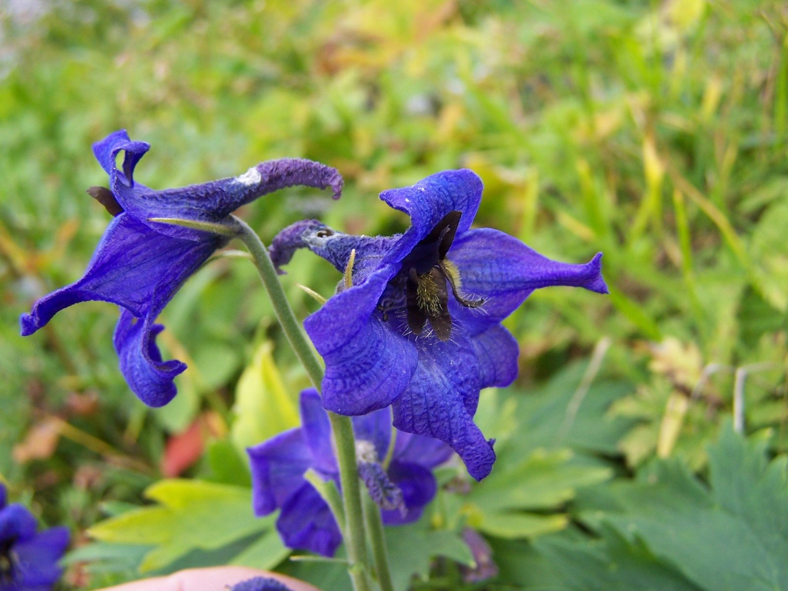 Delphinium oxysepalum (pl. ostróżka tatrzańska), habitat: Tatra Mountains, Czerwone Wierchy, Kobylarzowy Żleb